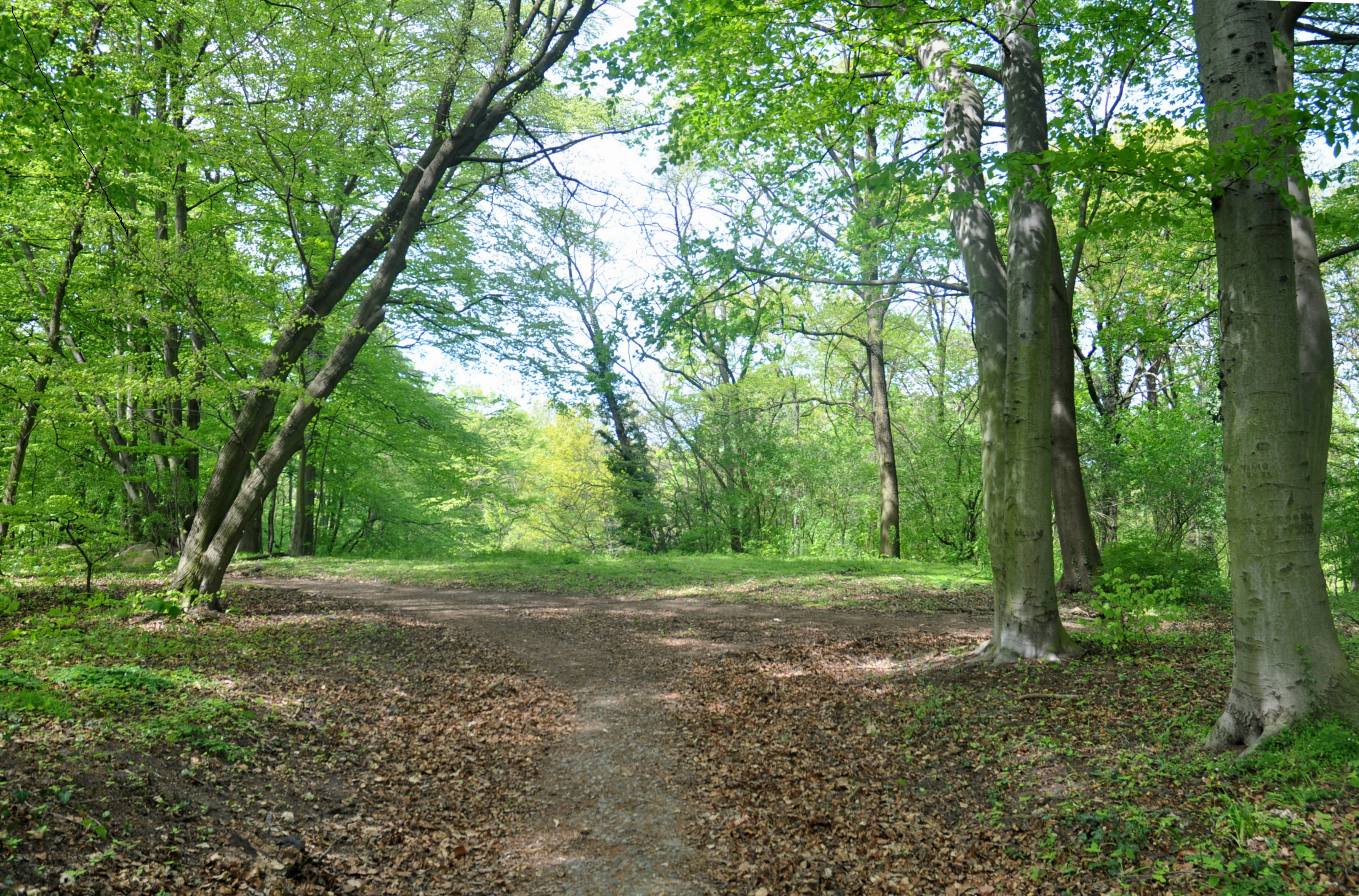 Das verwilderte Rondell auf dem Böttcherberg